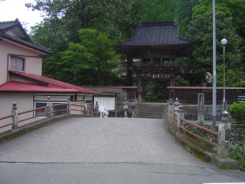 満願寺入り口